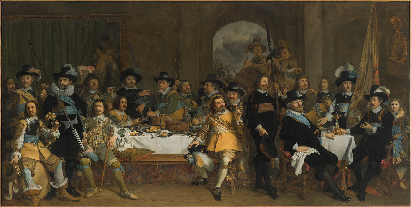 schilderij; Handboogdoelen; portret; groepsportret; schuttersstuk; Poll, Jan van de; Poll, Gijsbert van de; Vlak, Jasper; Pollio, Joannes; Benhards, Eiland; Krook, Abraham Pietersz.; Blocq, Reinier; Berken, Claes Barents van; Steur, Pieter Jacobs; Gekeer, Joost Jonasz; Kapel, Jan Hillebrantsz; Muijen, Philips Willems; Gerven, Pieter de; Calaber, Jacob; Vliet, Cornelis; Heems, Wouter Lambertz; Moures, Jan; Molenaar, Ant. Heindr.; Spilbergen, Floris; Poll, Mr. Harman (1751-1799)